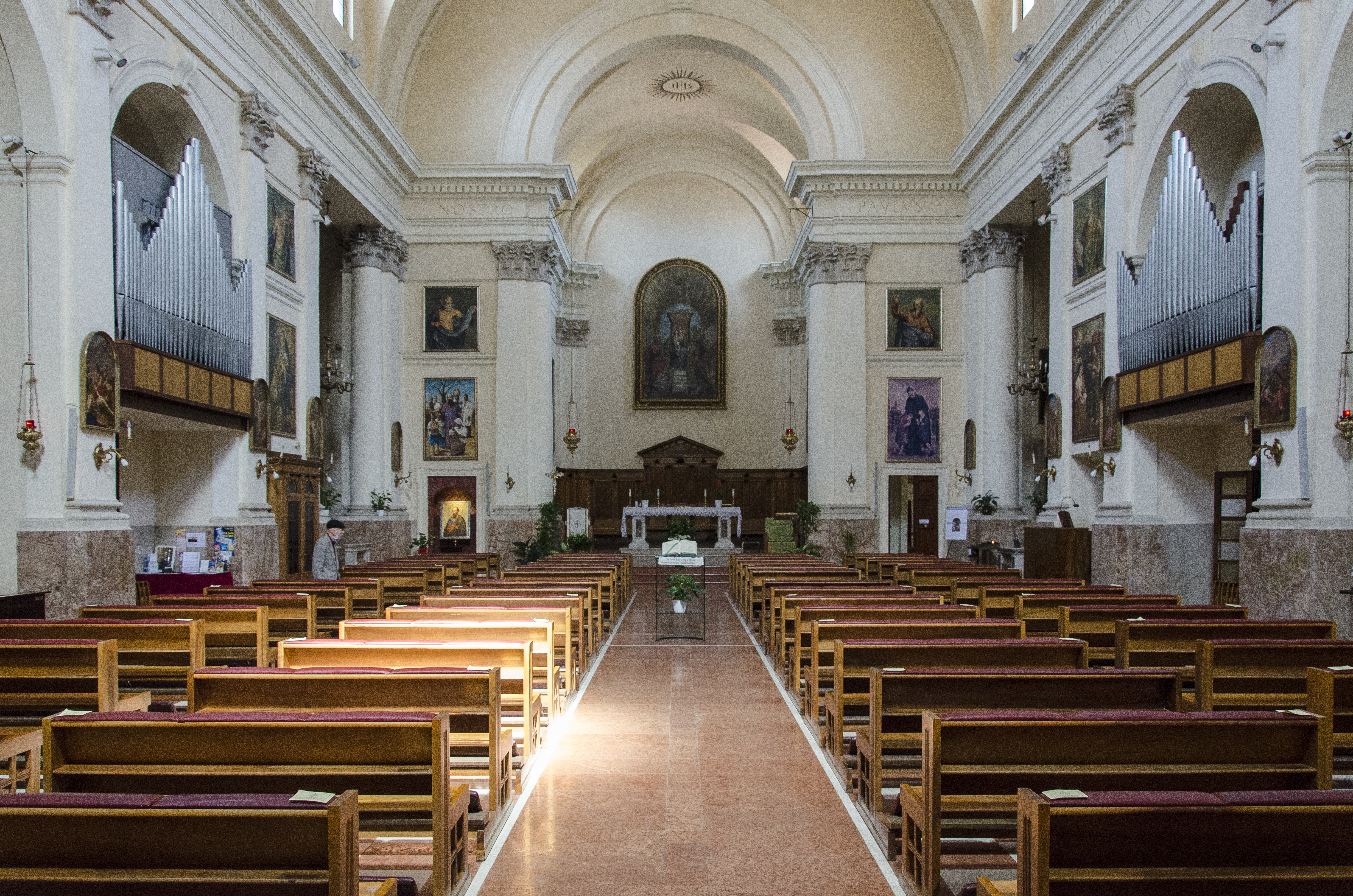 Chiesa di San Paolo a Verona, interno